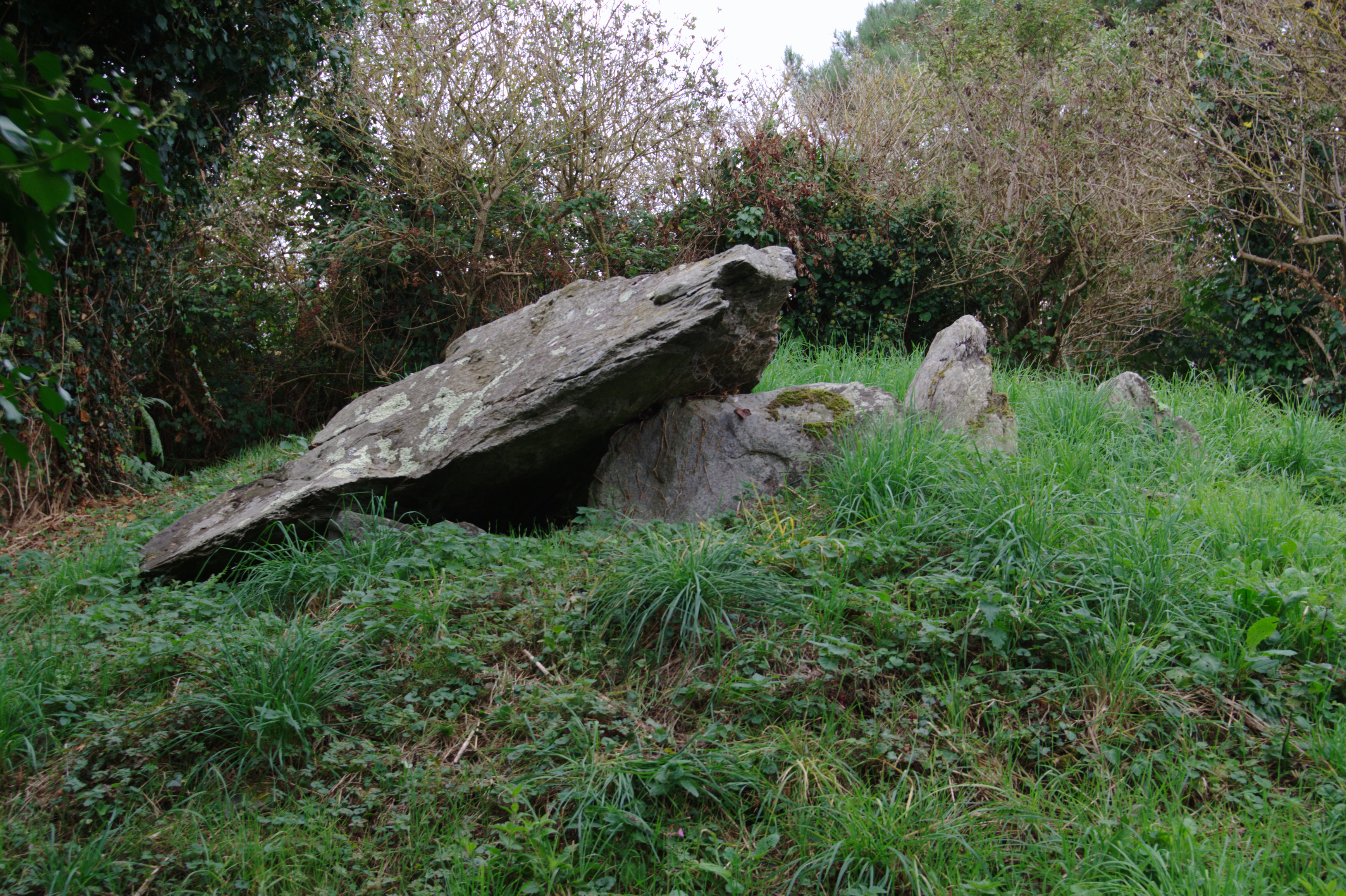 Karn Roskoualc'h e Tredraezh-Lokemo.